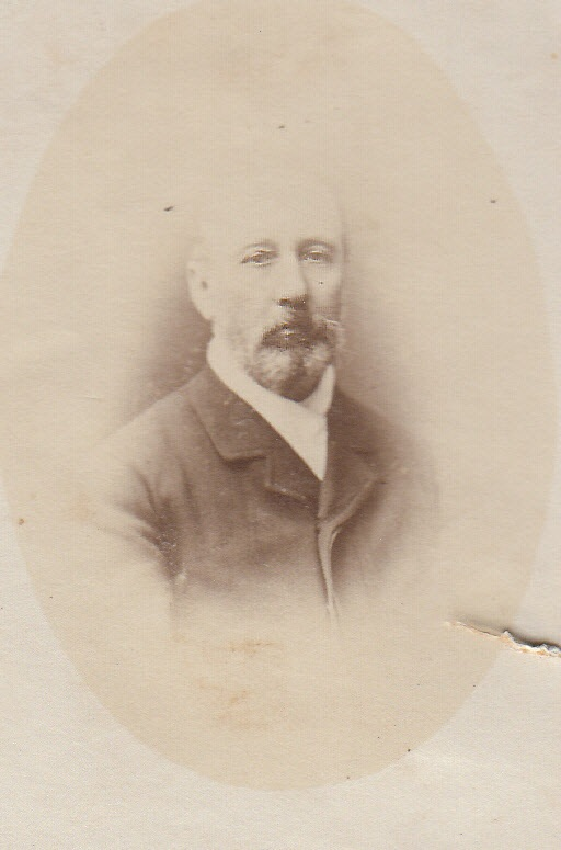 Fotogrefía capturada en 1880 en Santiago de Chile, Vicente Correa Albano nació el 12 de mayo de 1825 y falleció en 1884. Fotografía escaneada por mi el 13 de noviembre de 2014. Esta fotografía se encuentra en álbum familiar.